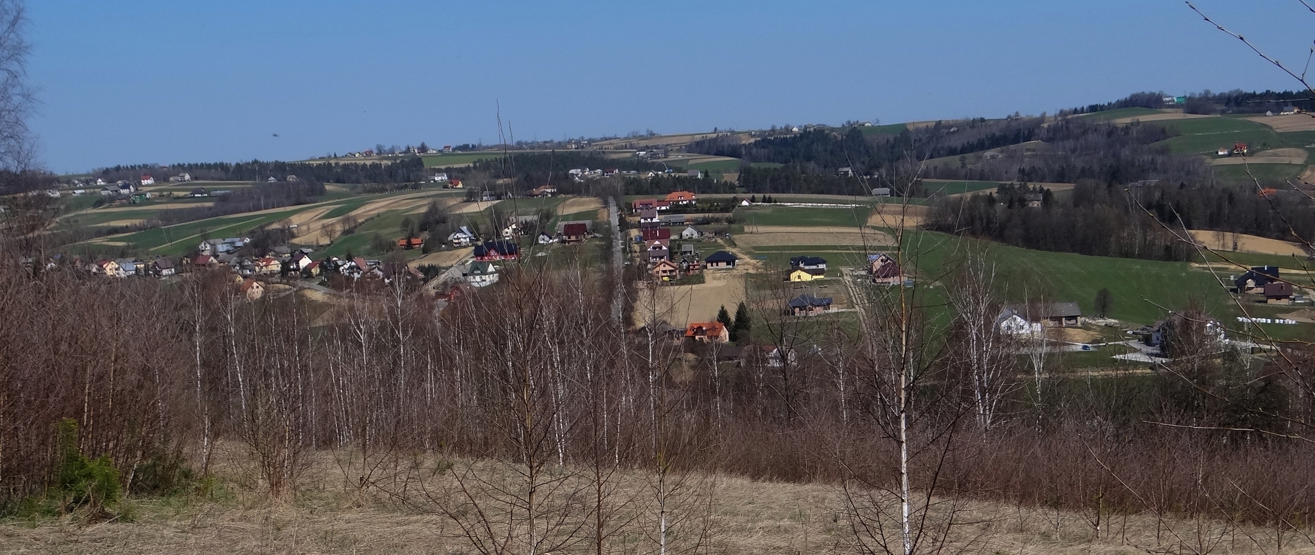 Jastrzębia - panorama widokowa